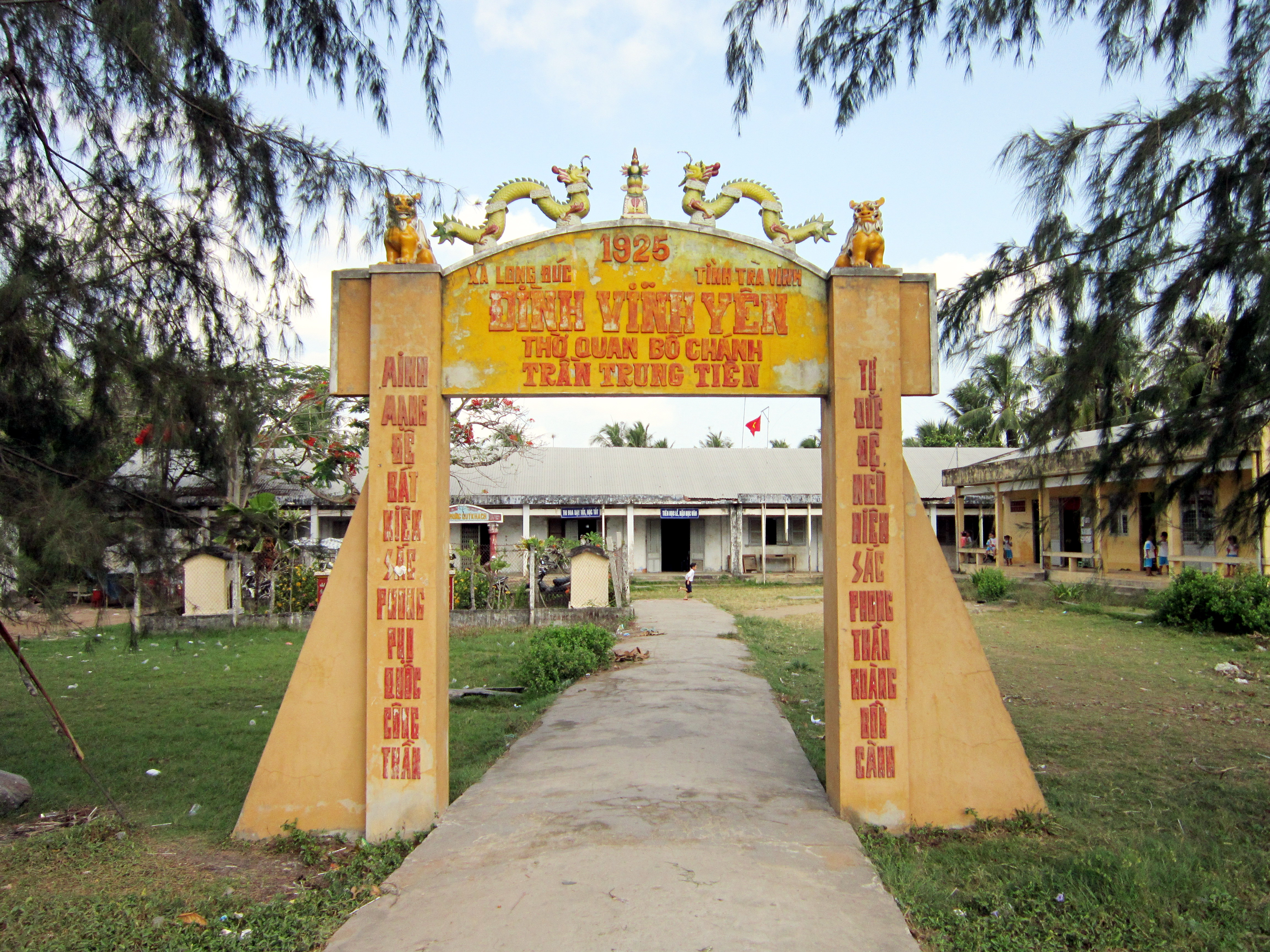 Cổng đình Vĩnh Yên ở TP Trà Vinh, Việt Nam. Ngôi đình đã bị một trường học cất sau che khuất. Trong đình có bàn thờ Bố chánh Trần Trung Tiên (hay Trần Tuyên).